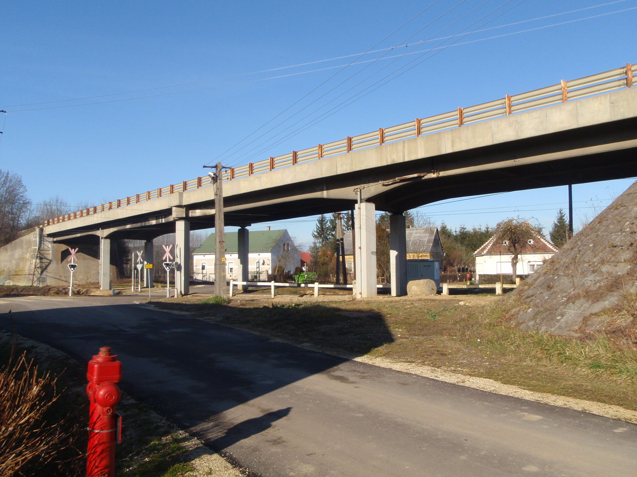 B8 in Ungarn, Wegebrücke Über Ungarische Westbahn bei Rátót